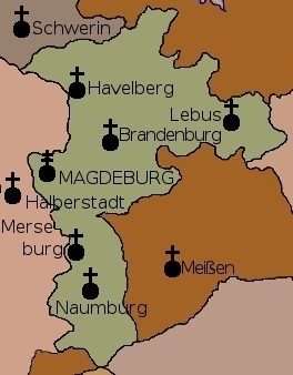 Die alte Kirchenprovinz Magdeburg